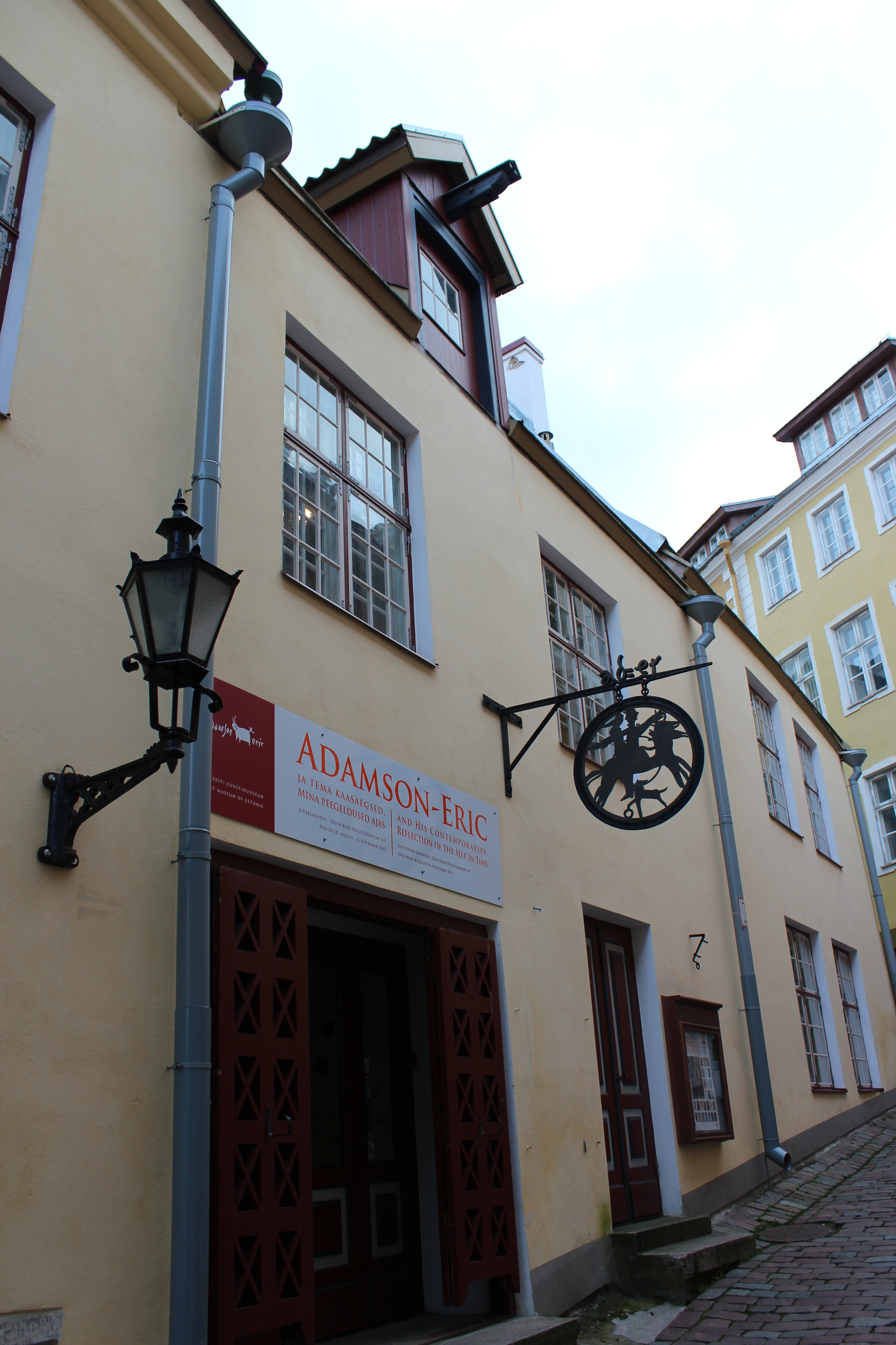 Adamson-Ericu muuseum (Lühike jalg 3)